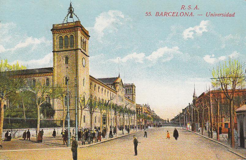 Université de Barcelone, carte postale ancienne colorisée, antérieure à 1914.